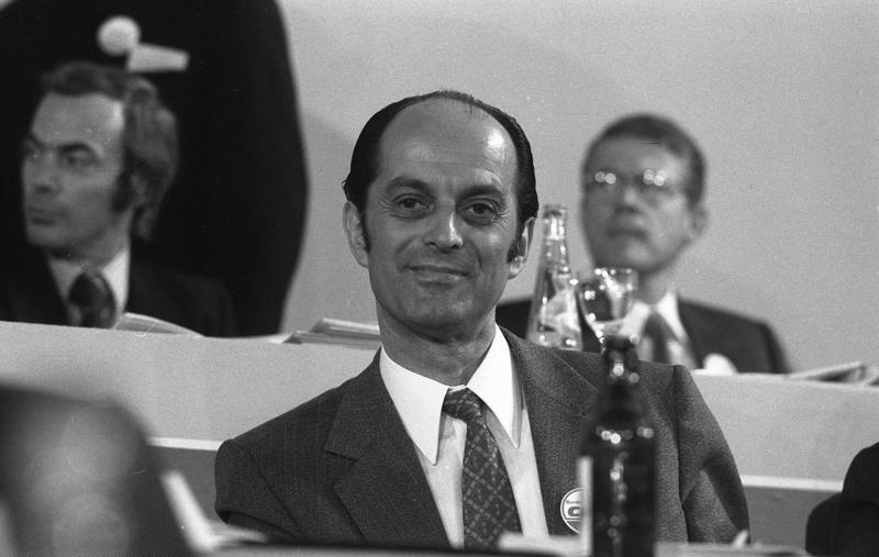 CDU-Parteitag 1972 in der Wiesbadener Rhein-Main-Halle (Heinrich Windelen) 9.-11.10.1972